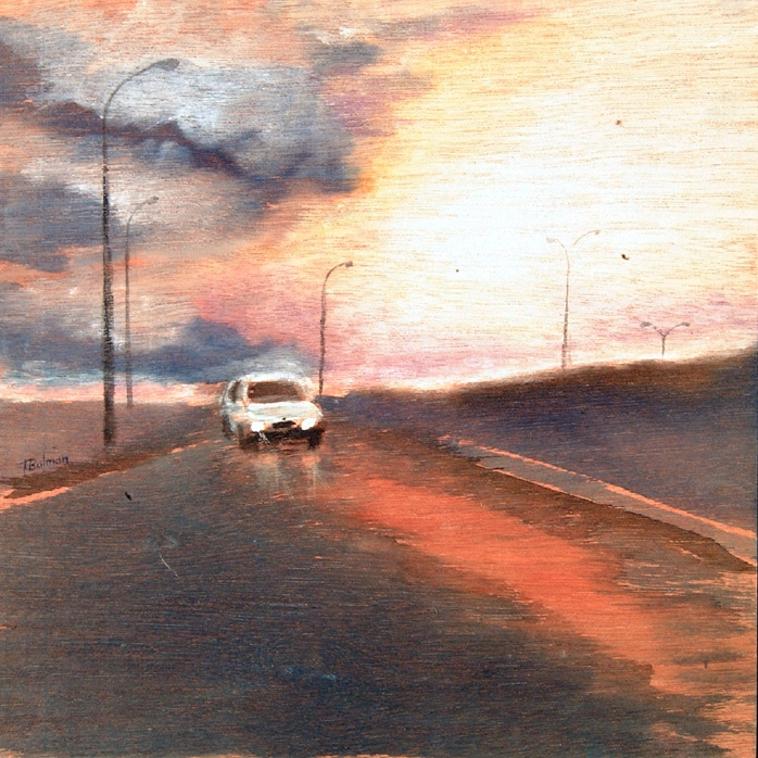 מכונית בכביש